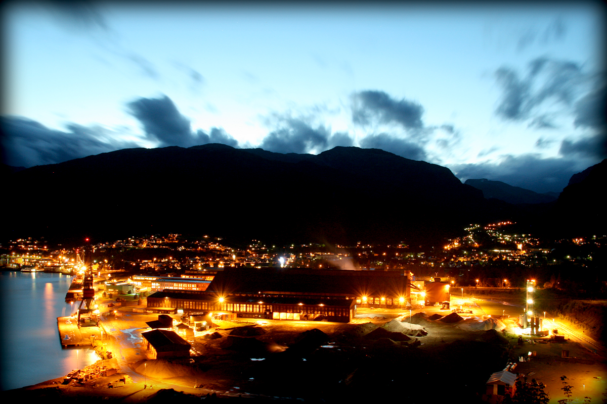 Sauda Smelteverk, Foto: Vidar Solheim